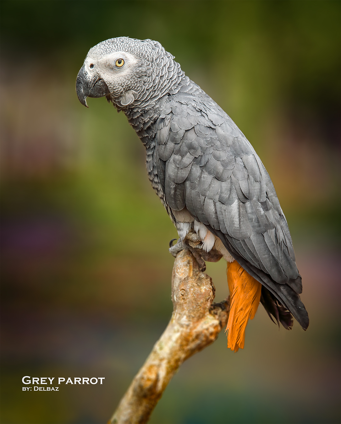 کاسکو کنگو در باغ پرندگان تهران فروردین 1397